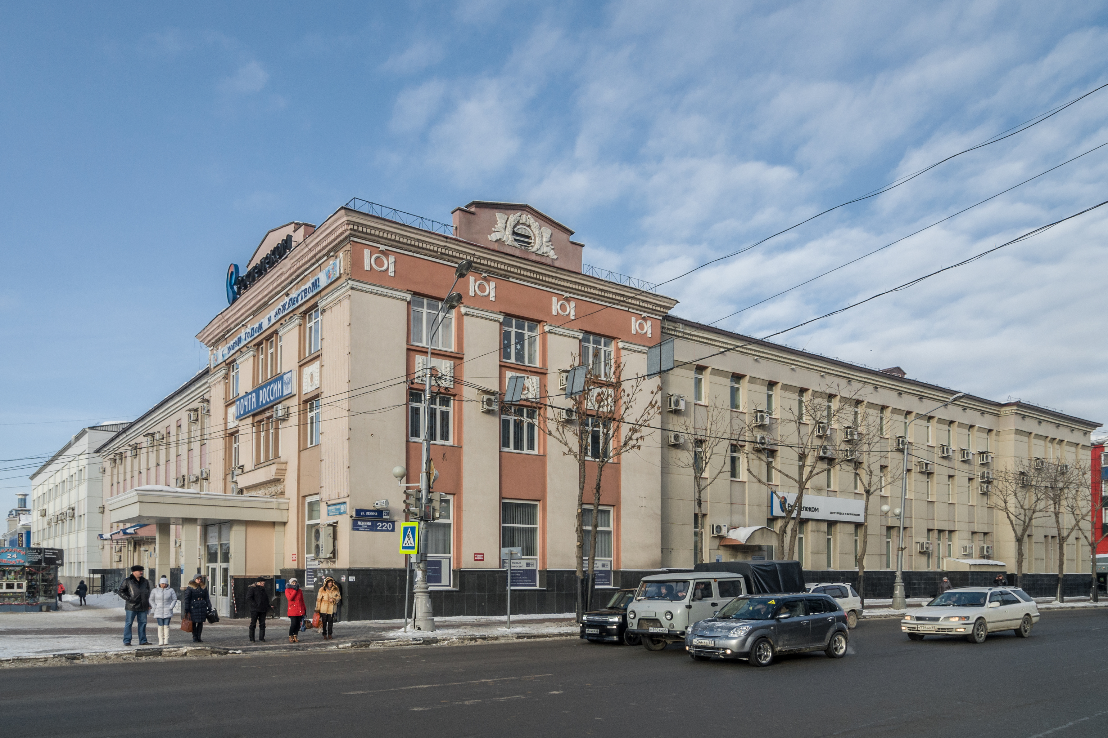 Здание почтамта: улица Ленина, 220, Южно-Сахалинск, Сахалинская область